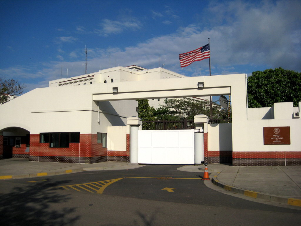 U.S. Embassy in El Salvador.